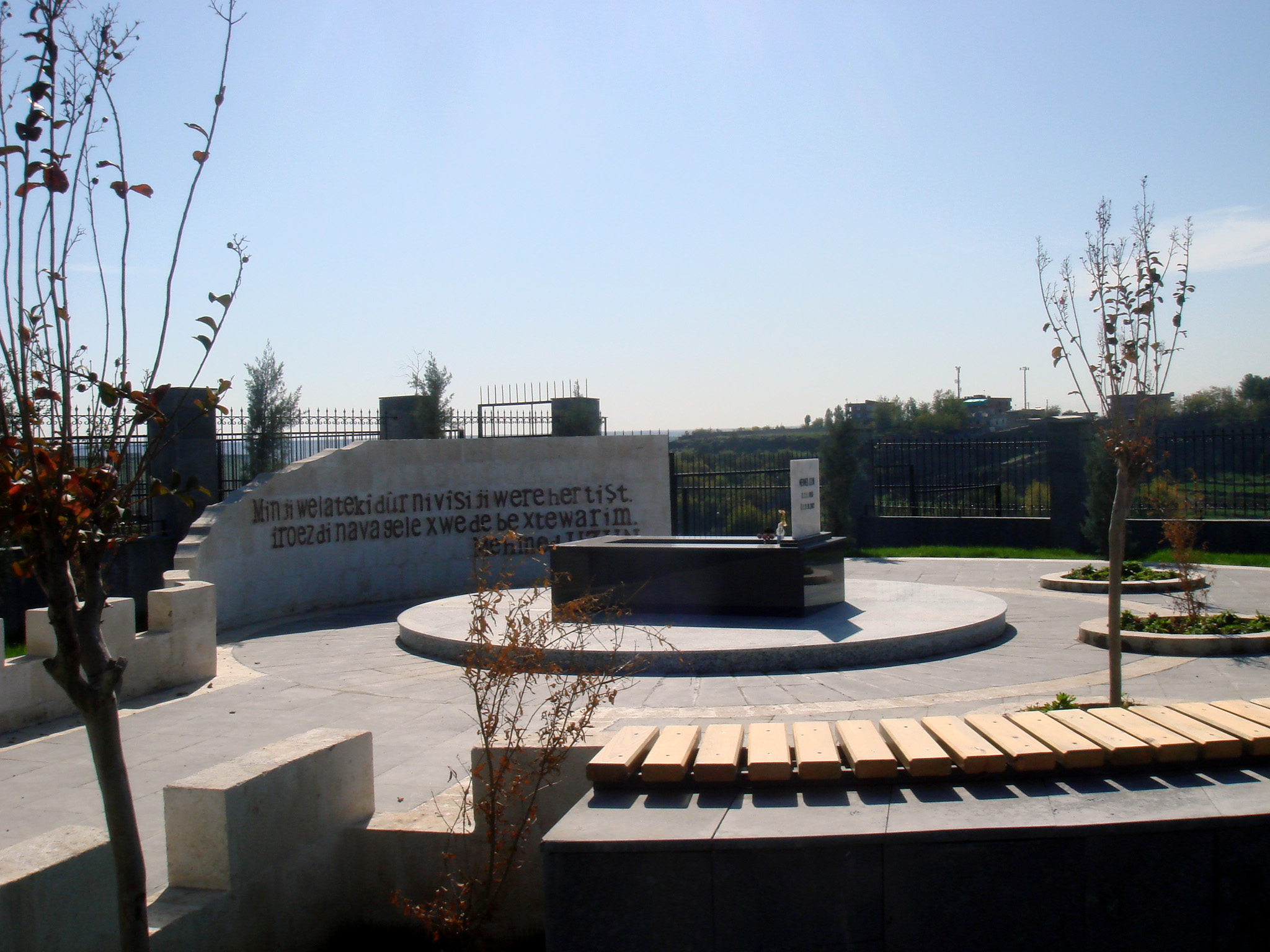 Kurdî: Gora nivîskarê Mehmed Uzun, li Amedê